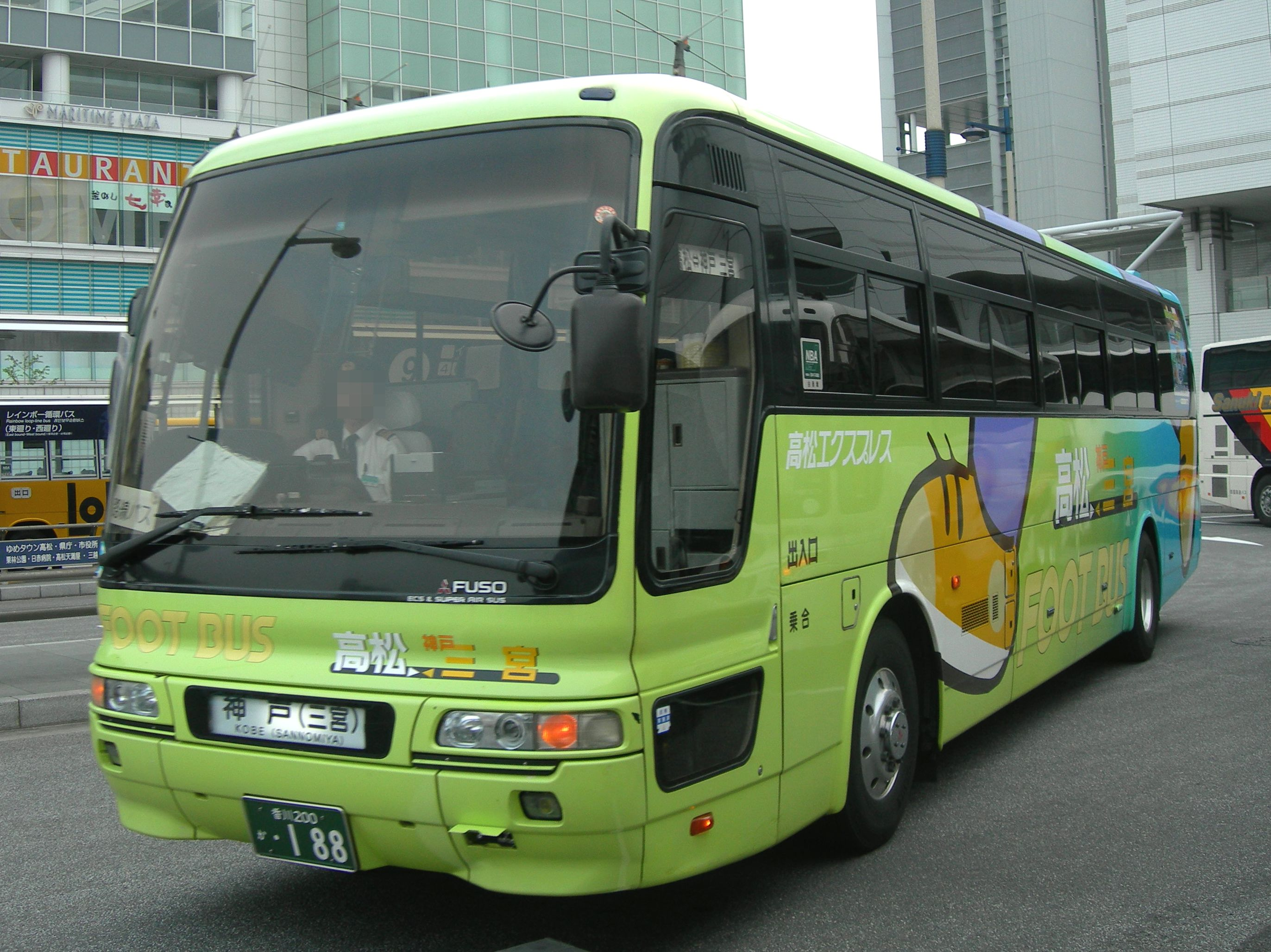 高松エクスプレス『フットバス神戸線』